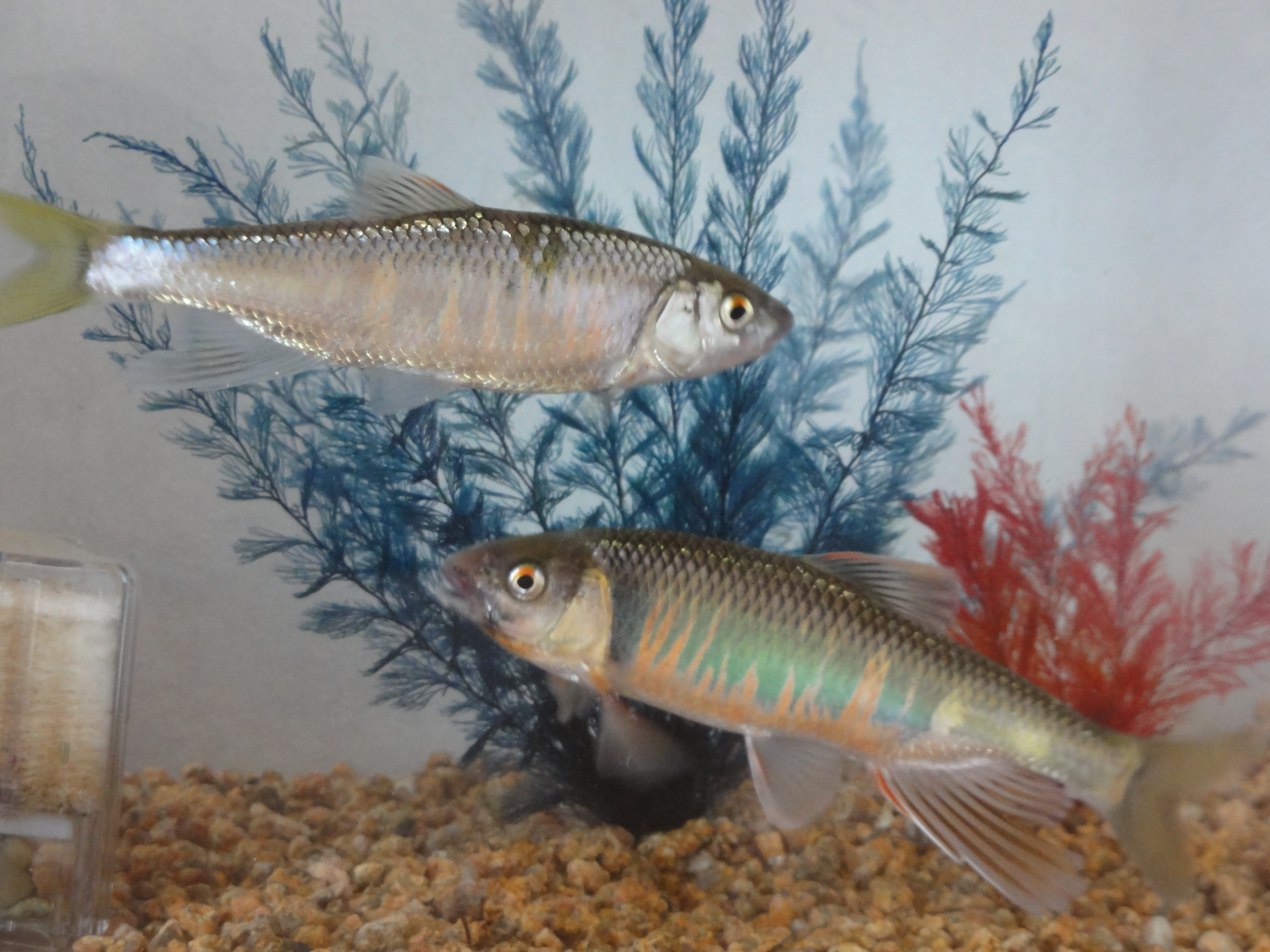 オイカワ婚姻色